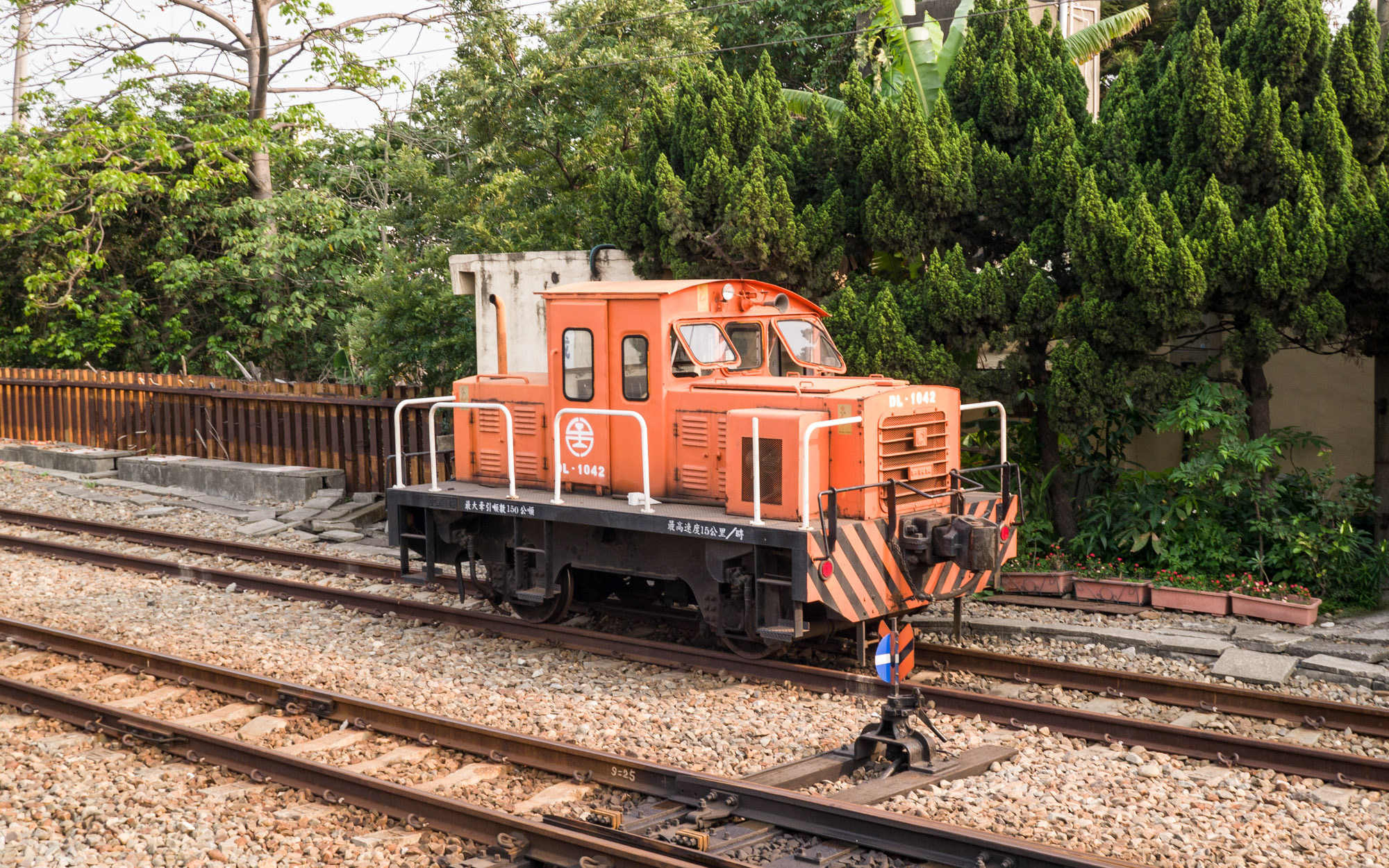 臺灣鐵路管理局DL1000型貨車移動機DL1042停靠成功車站。